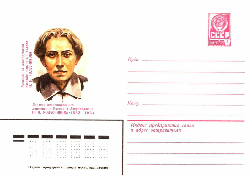 Художественные маркированные конверты 1982 года.